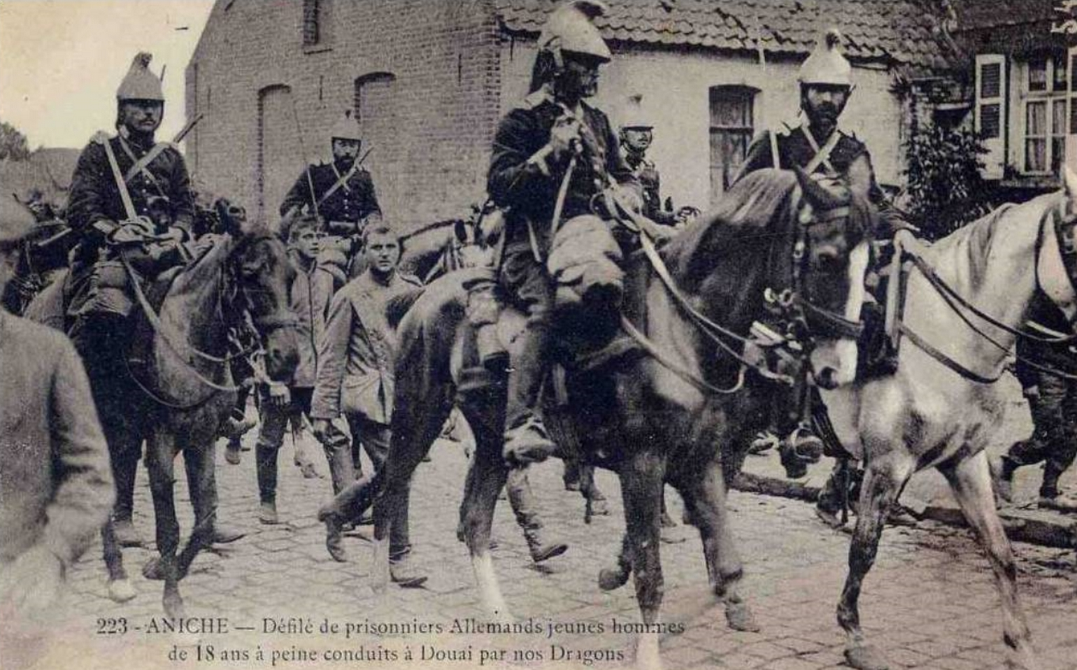 Défilé de prisonniers Allemands, Aniche, Nord, Nord-Pas-de-Calais, France.